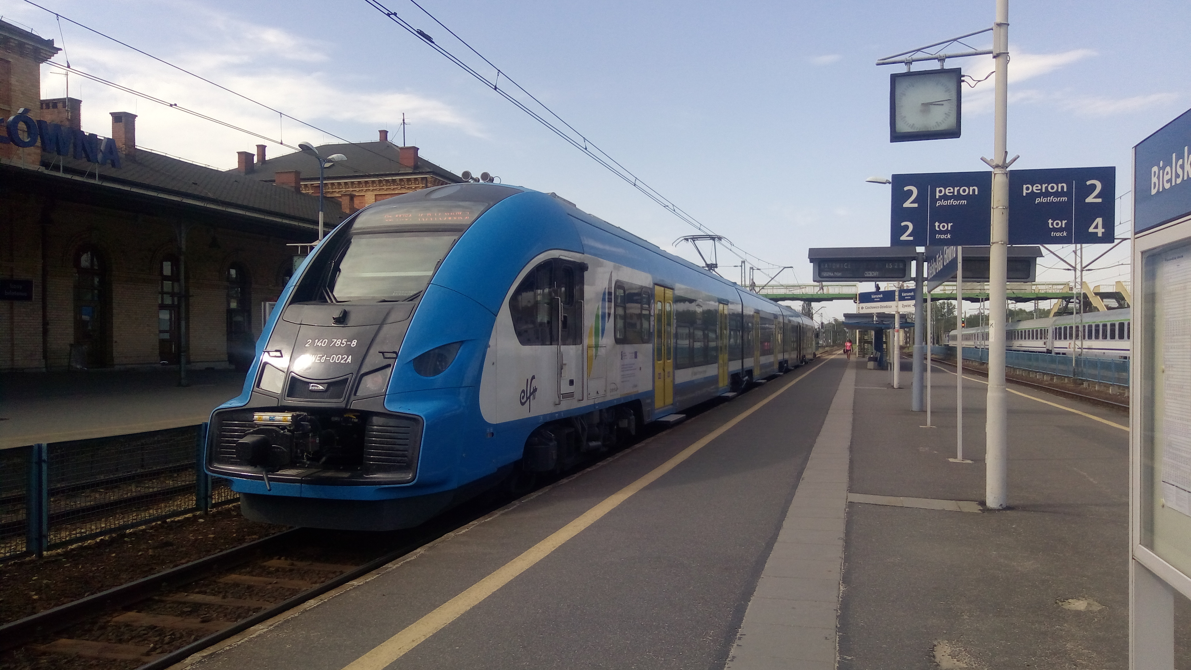 EZT 22WEd (Pesa Elf II) Kolei Śląskich na stacji Bielsko-Biała Główna jako pociąg osobowy S5 Bielsko-Biała Główna - Katowice